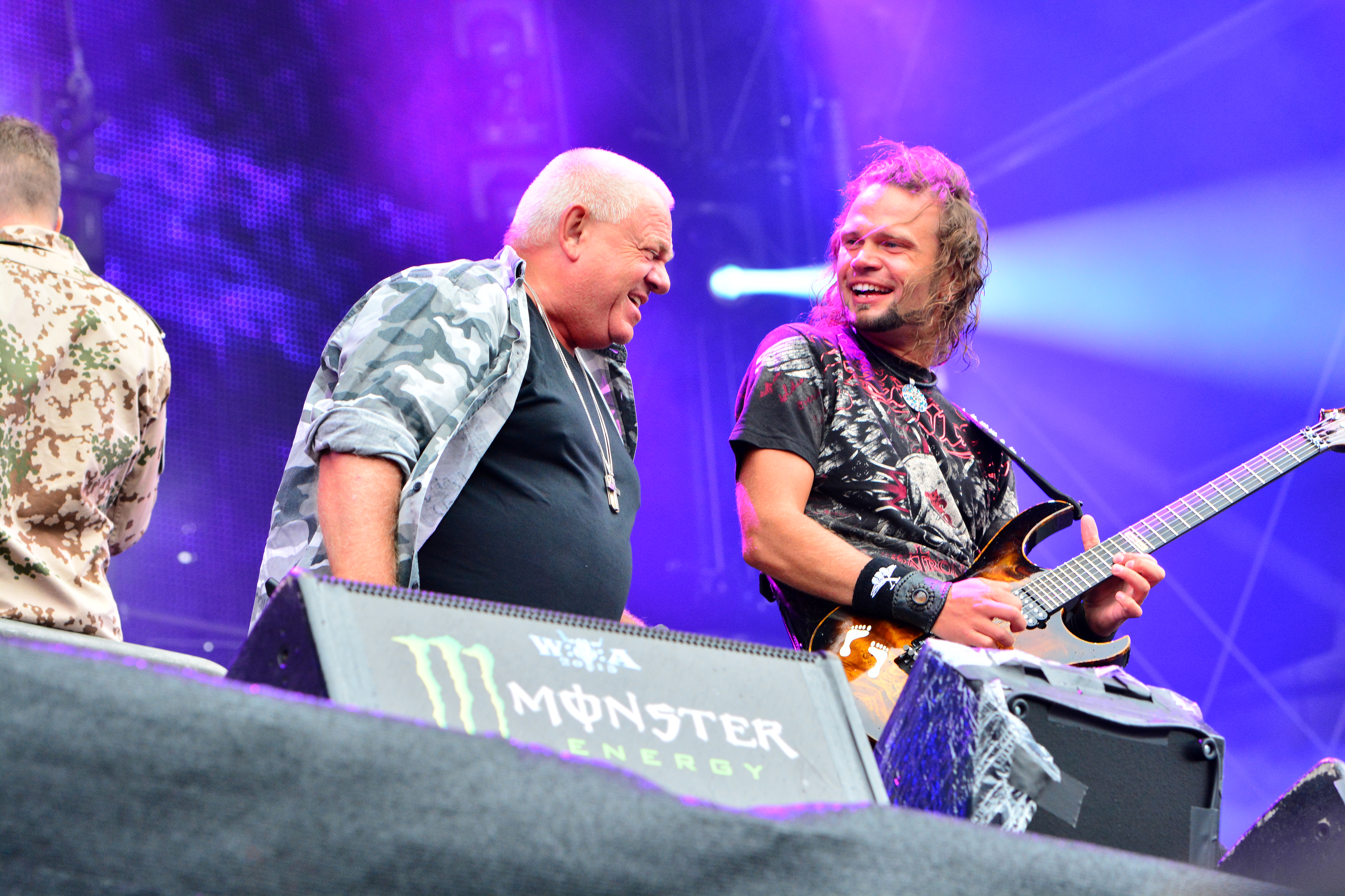 U.D.O. beim Wacken Open Air 2015